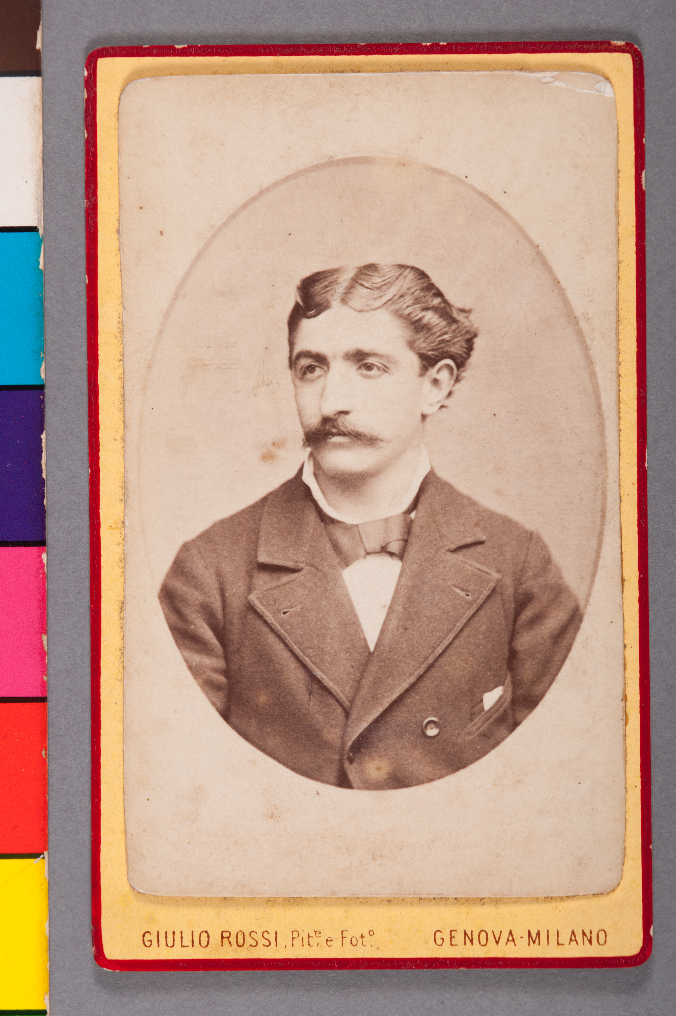 Obra que integra o acervo do Museu Paulista da USP. Coleção Carlos Eugênio Marcondes de Moura